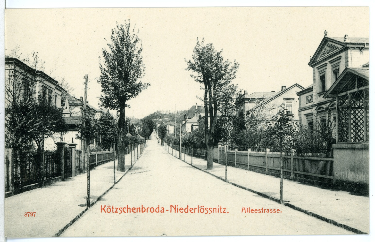 Kötzschenbroda; Alleestraße This postcard is from publisher Brück & Sohn in Meißen ( postcard has a unique number 08797 and is available in a higher resolution at the publisher. This images was uploaded in a cooperation project between Wikipedians and the publisher.